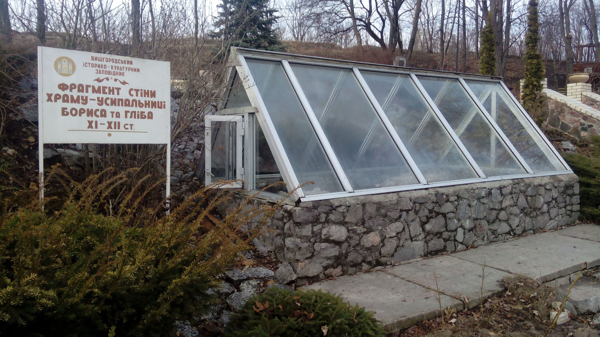 Церква святих страстотерпців Бориса і Гліба, Вишгород, вул. П. Калнишевського, 11а